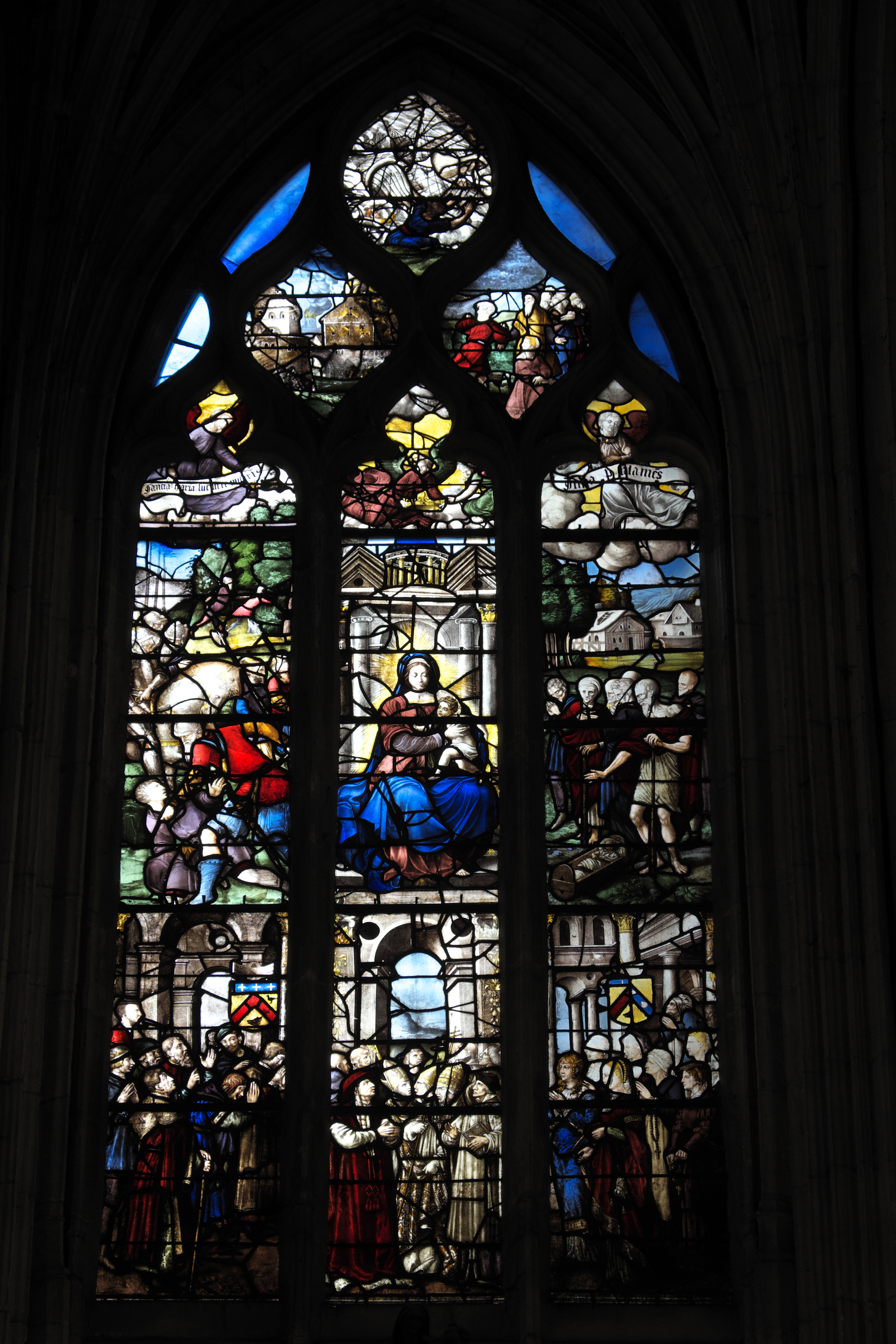 Katholische Kirche Sainte-Foy in Conches-en-Ouche im Département Eure (Haute-Normandie/Frankreich), Bleiglasfenster aus der 1. Hälfte des 16. Jahrhunderts; Darstellung: Madonna mit Kind